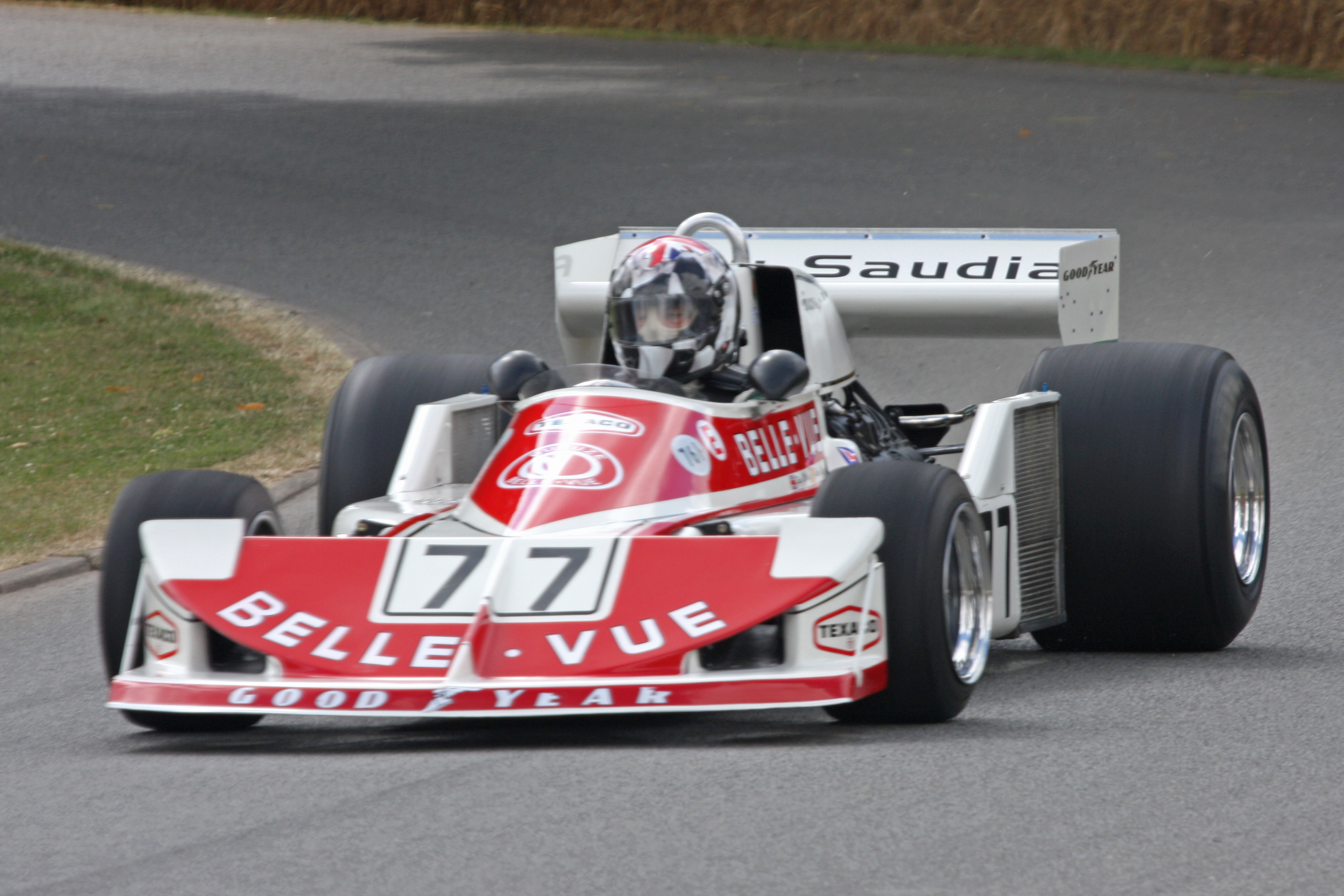 Goodwood 2009